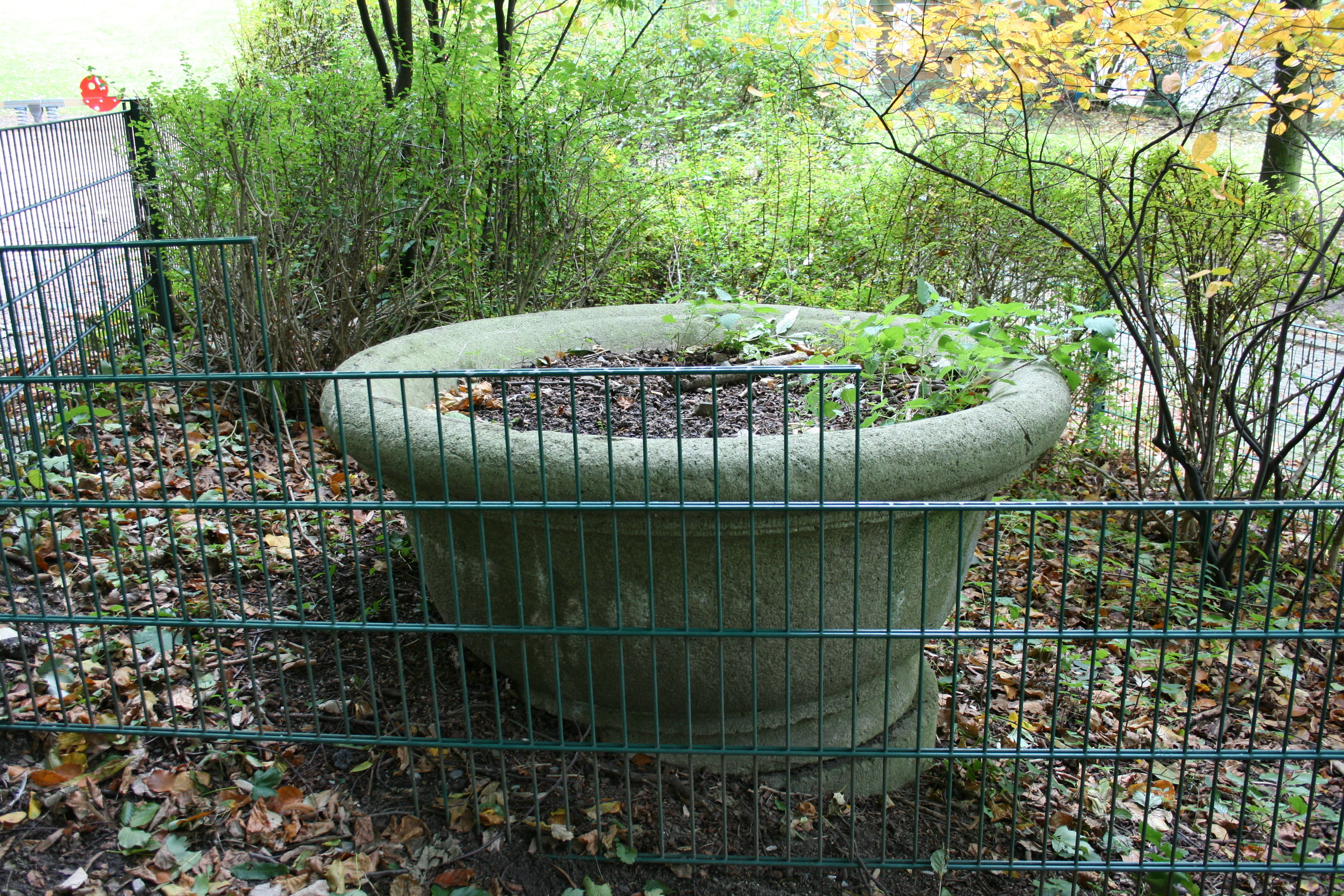 Rest vom 'Brunnen am Schwarzen Mann' in Wuppertal